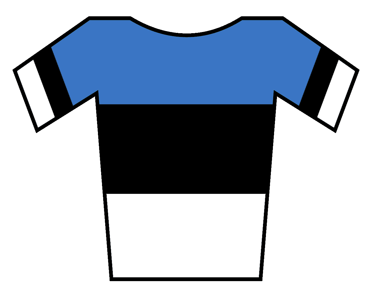 Maillot de Estonia